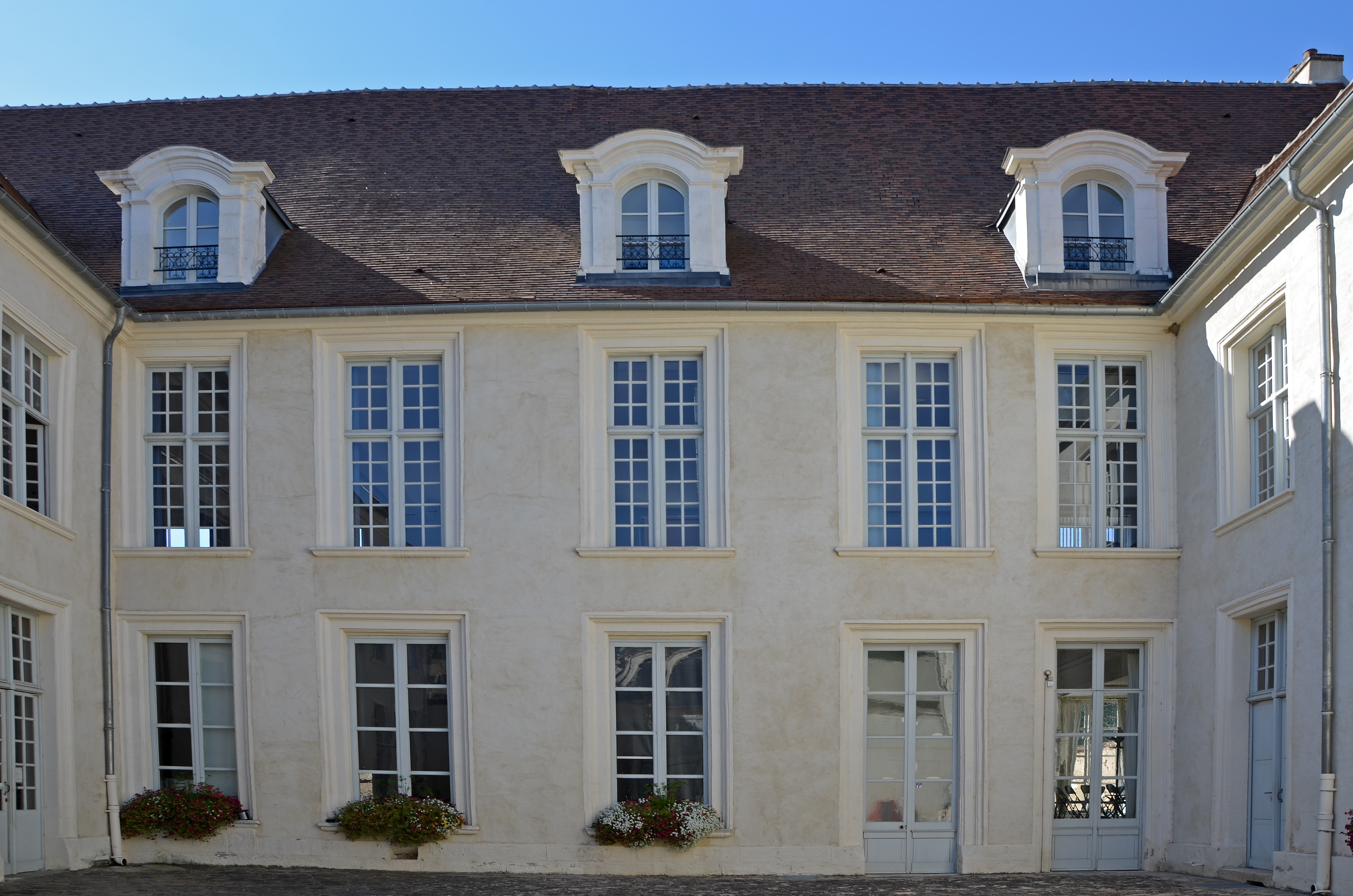 Ancien hôtel de ville de Sens, Yonne, Bourgogne, France